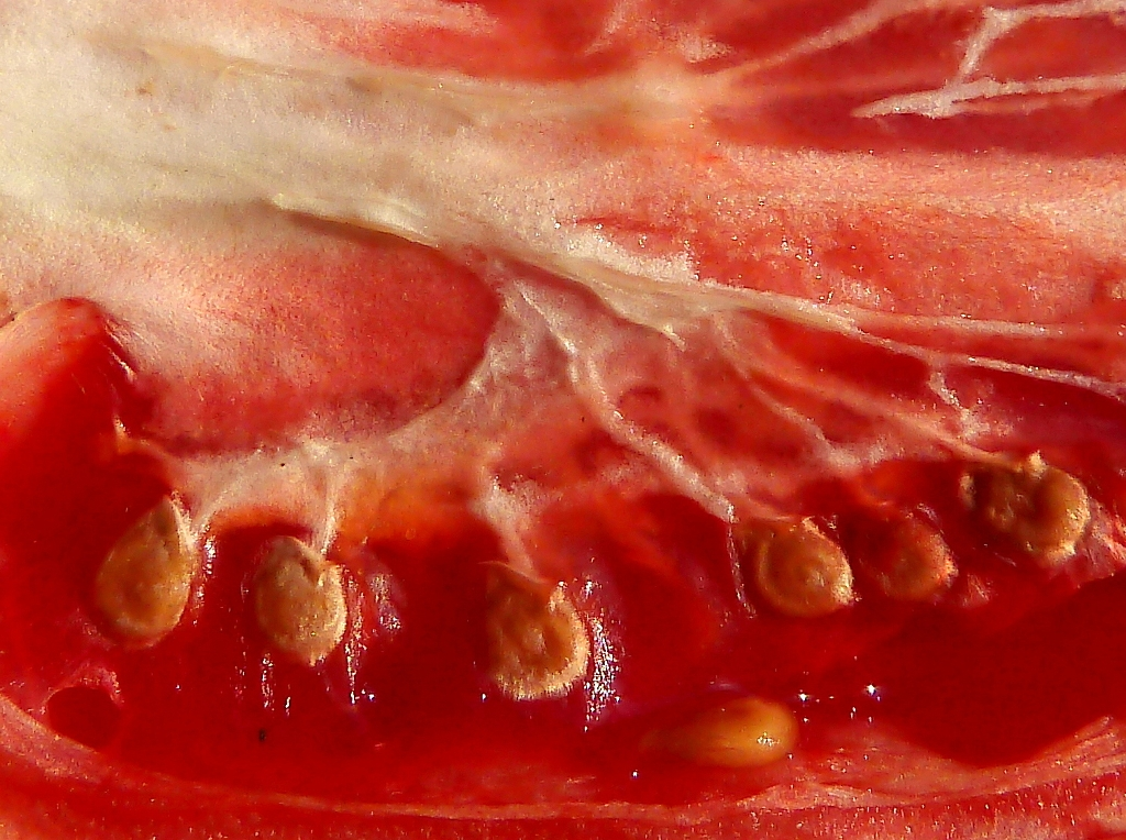 Solanum lycopersicum cv. pera - Corte longitudinal de un tomate y su morfología interna : detalle de la placentación - Comercio, Águilas, Murcia (España).